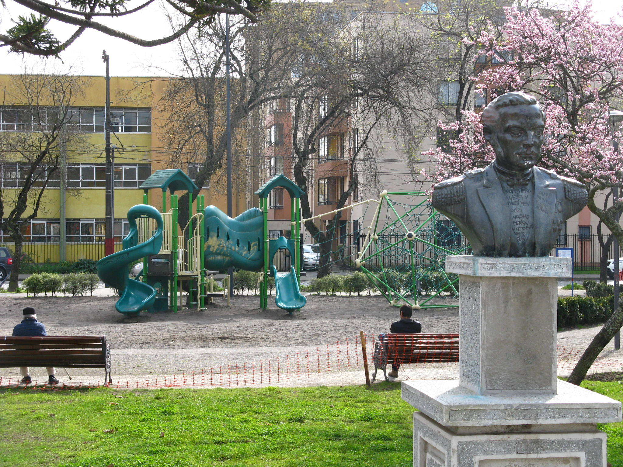 Plaza Carlos Condell Concepción, Chile agosto de 2012